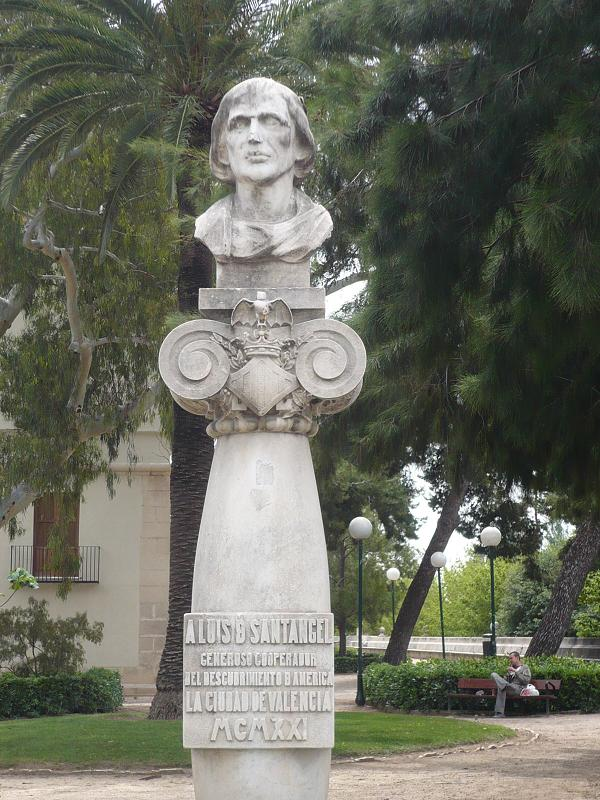 Escultura dedicada a Luis Santangel en la Alameda de Valencia, España